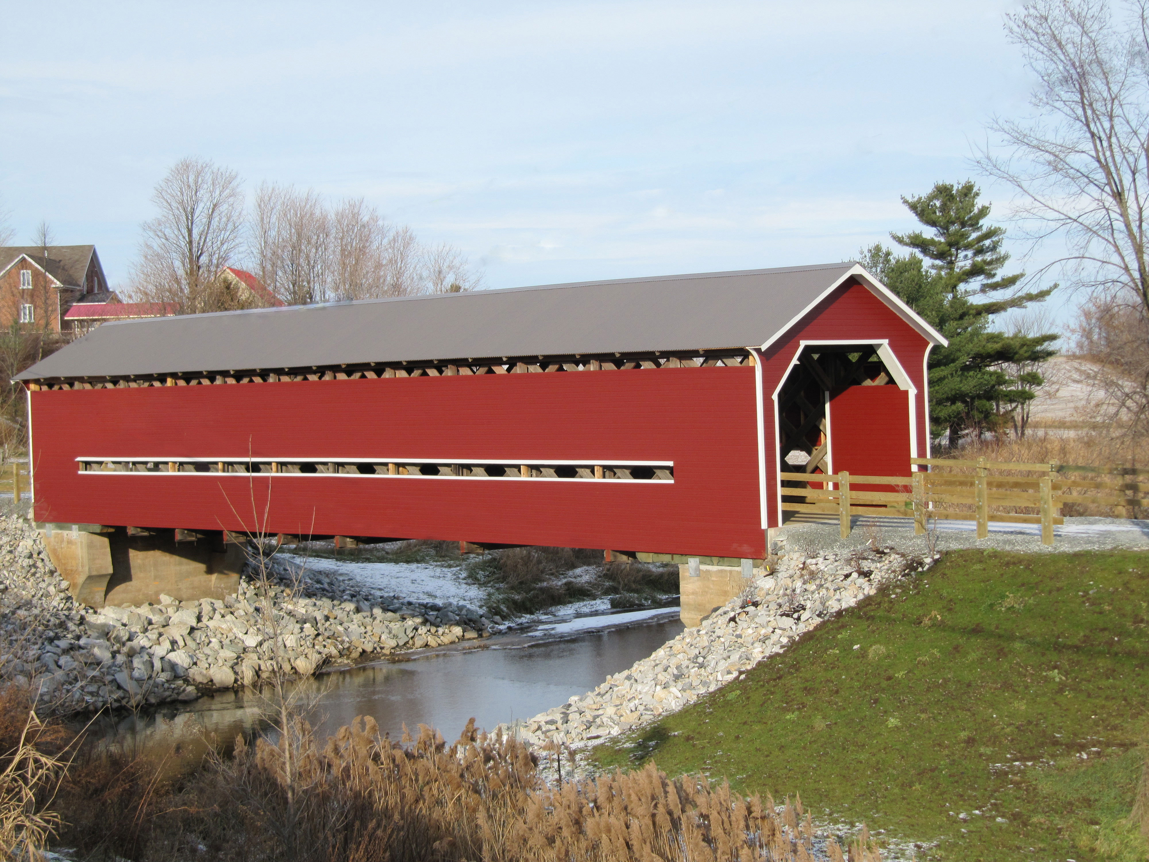 Pont Joseph-Édouard-Perrault après les rénovations de 2011